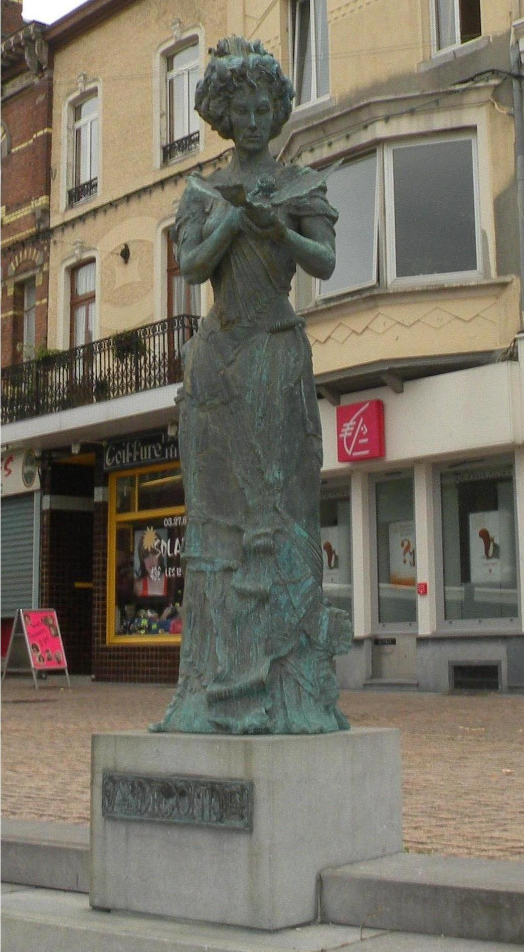 Aldegonde de Maubeuge statue à hautmont, nord, france